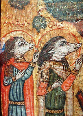 saints Ahrakas and Augani «Житие коптского св. Меркурия Абу-Сефейна (в переводе с арабского Меркурия «отца о двух мечах») упоминает о двух святых с собачьей головой — Ахракасе и Аугани, которые верно служили ему и повсюду сопровождали. Эти святые изображены и на коптской иконе XVIII века, хранящейся в Коптском музее.» Е.Г. Толмачева - Копты: Египет без фараонов.